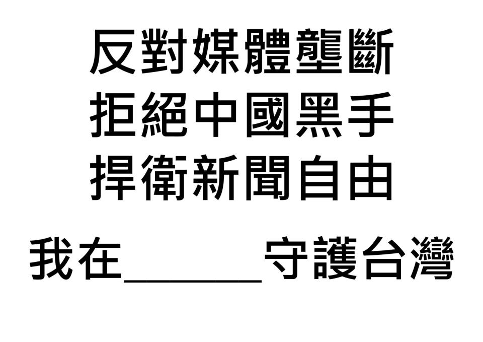 廣泛流傳之純文字, 無版權且可任意增減/自由修訂, 出處已難考證 Commonly spread and used words for the movement and it's free for everyone to adjust without copyright